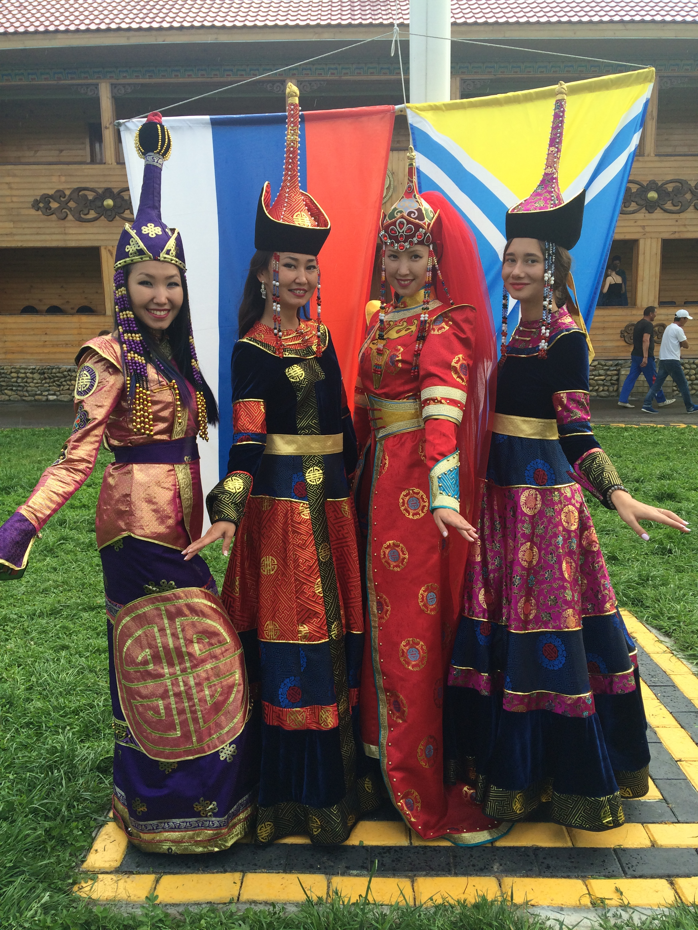 Тыва дыл: Аныяктар хүрежинде даңыгналар. Наадым-2016. 2016ч 8а 13х